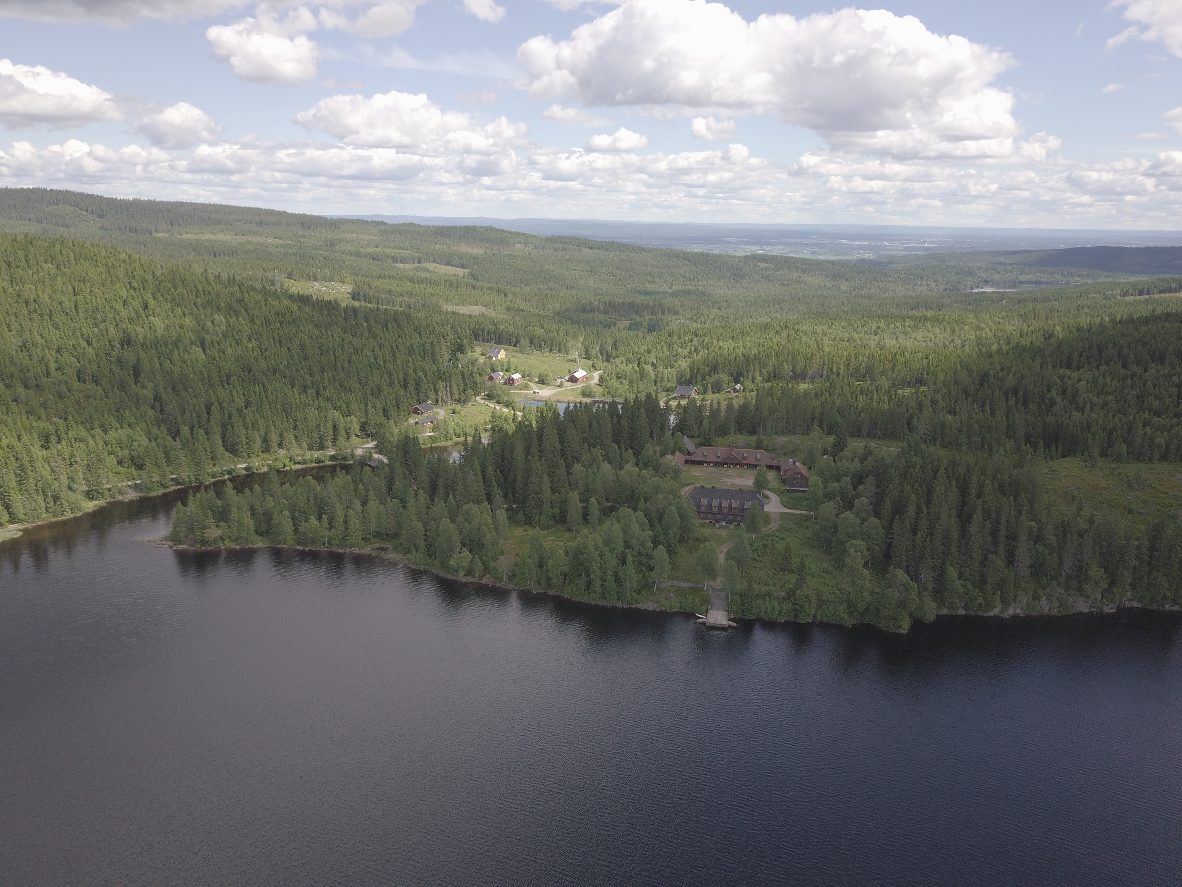 Råsjøen og jaktslottet i Romeriksåsen